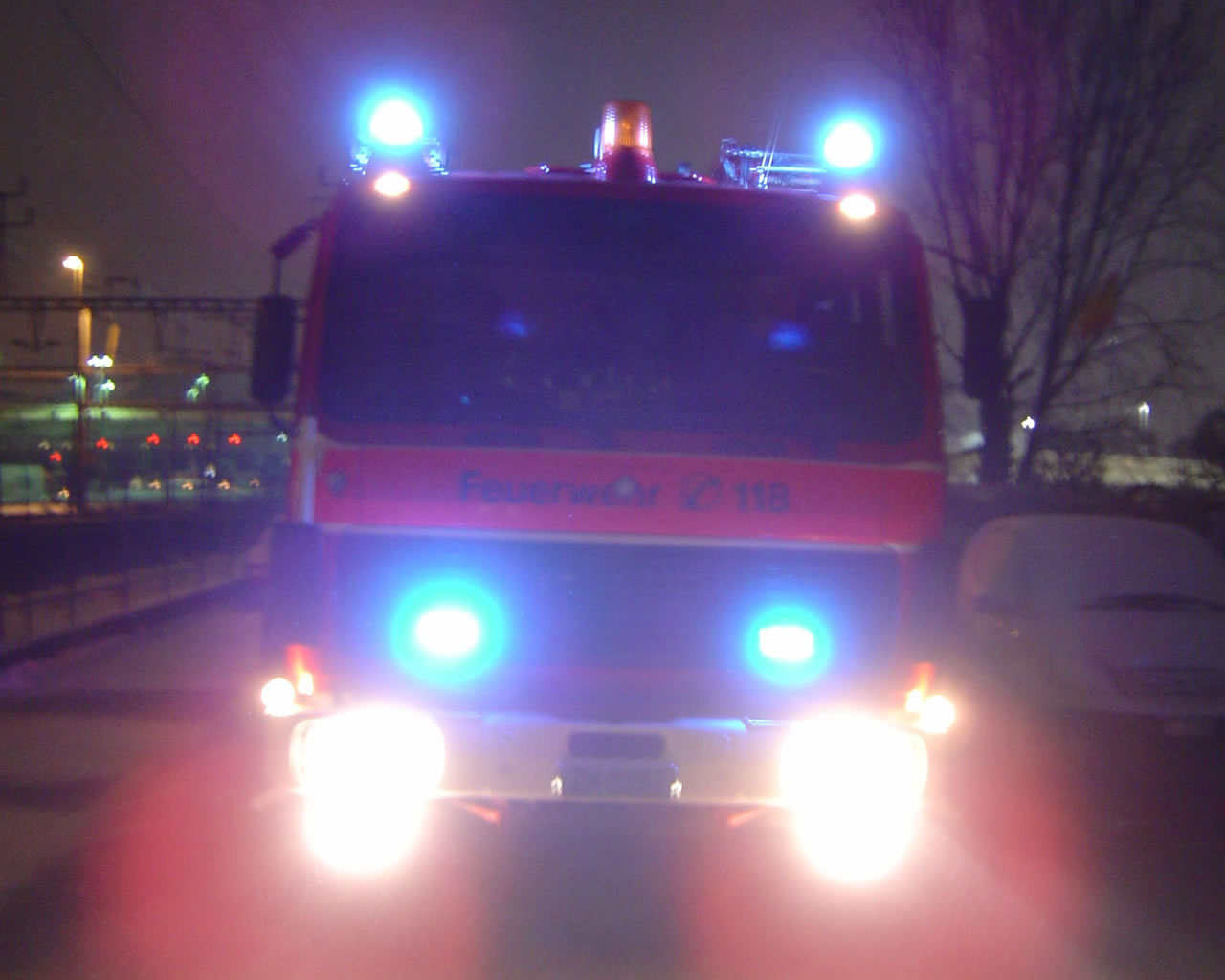 Ein Feuerwehrfahrzeug der Feuerwehr der Stadt Zürich auf Einsatzfahrt.